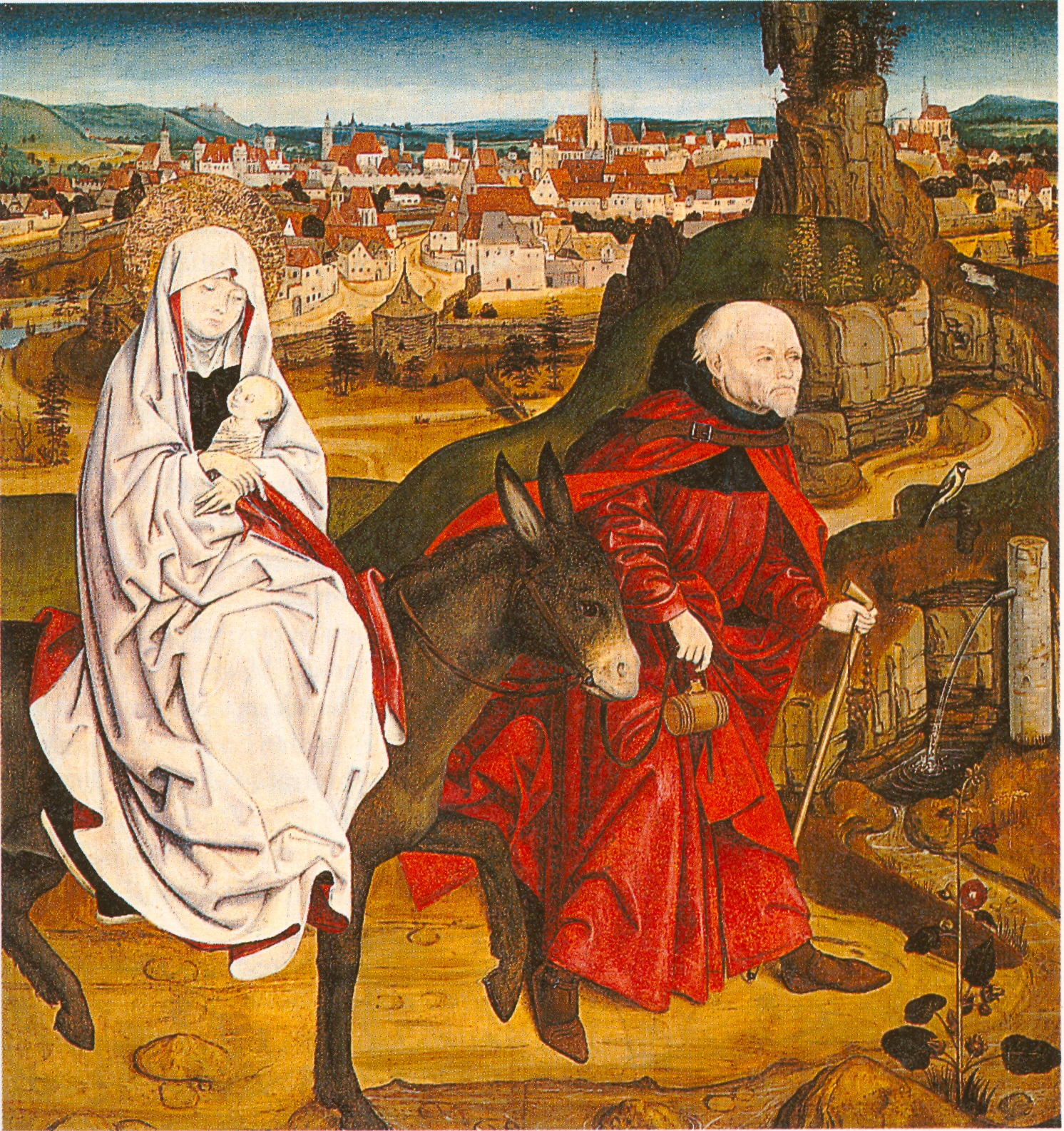 Die Stadt Wien Hintergrund der Flucht der Heiligen Familie nach Ägypten Wien, Schottenstift